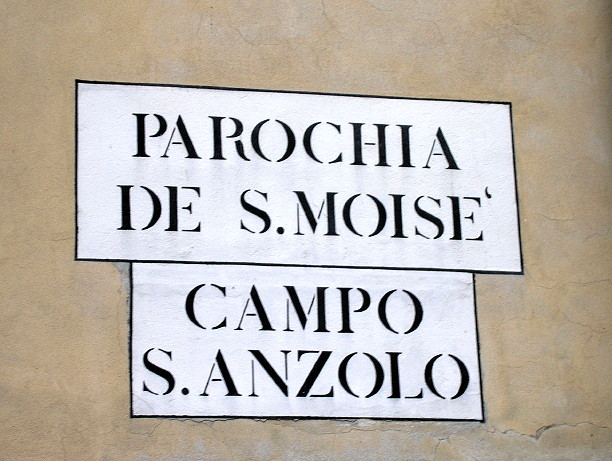 Nissioetto (targa stradale) a Venezia.